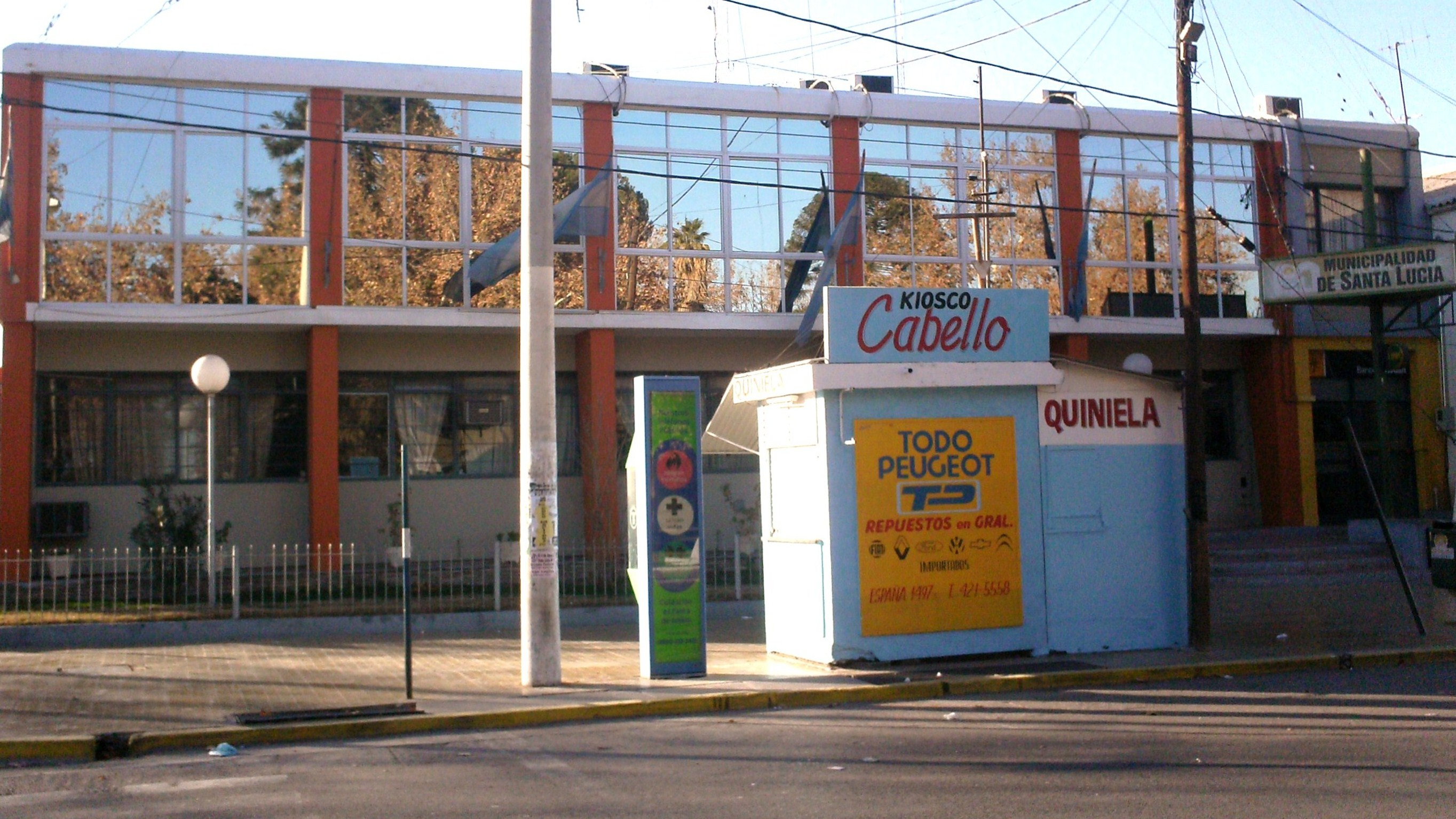 el edificio de la municipalidad de santa lucia